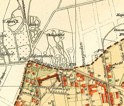 Kart over Adamstua.